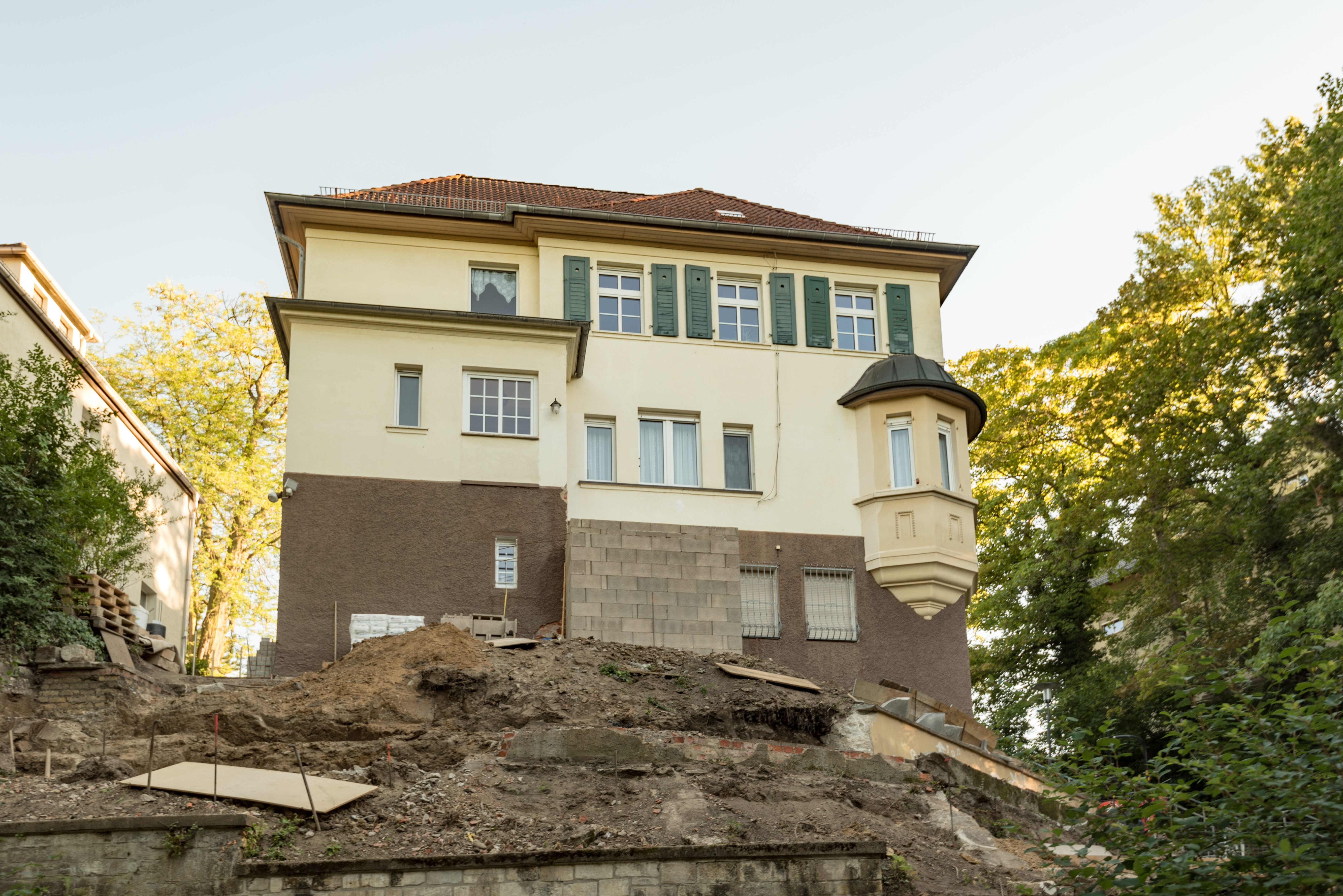 Weißenfels, Am Stadtpark 1